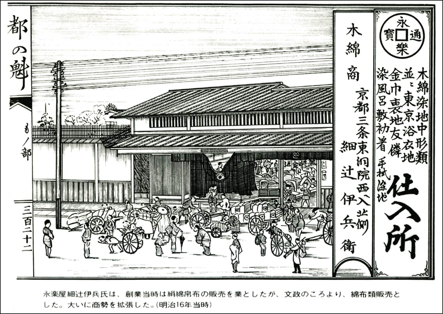 明治16年刊行の「都の魁：工商技術」。木綿商として掲載された永楽屋。場所は三条通沿い烏丸と東洞院の間（北側）。